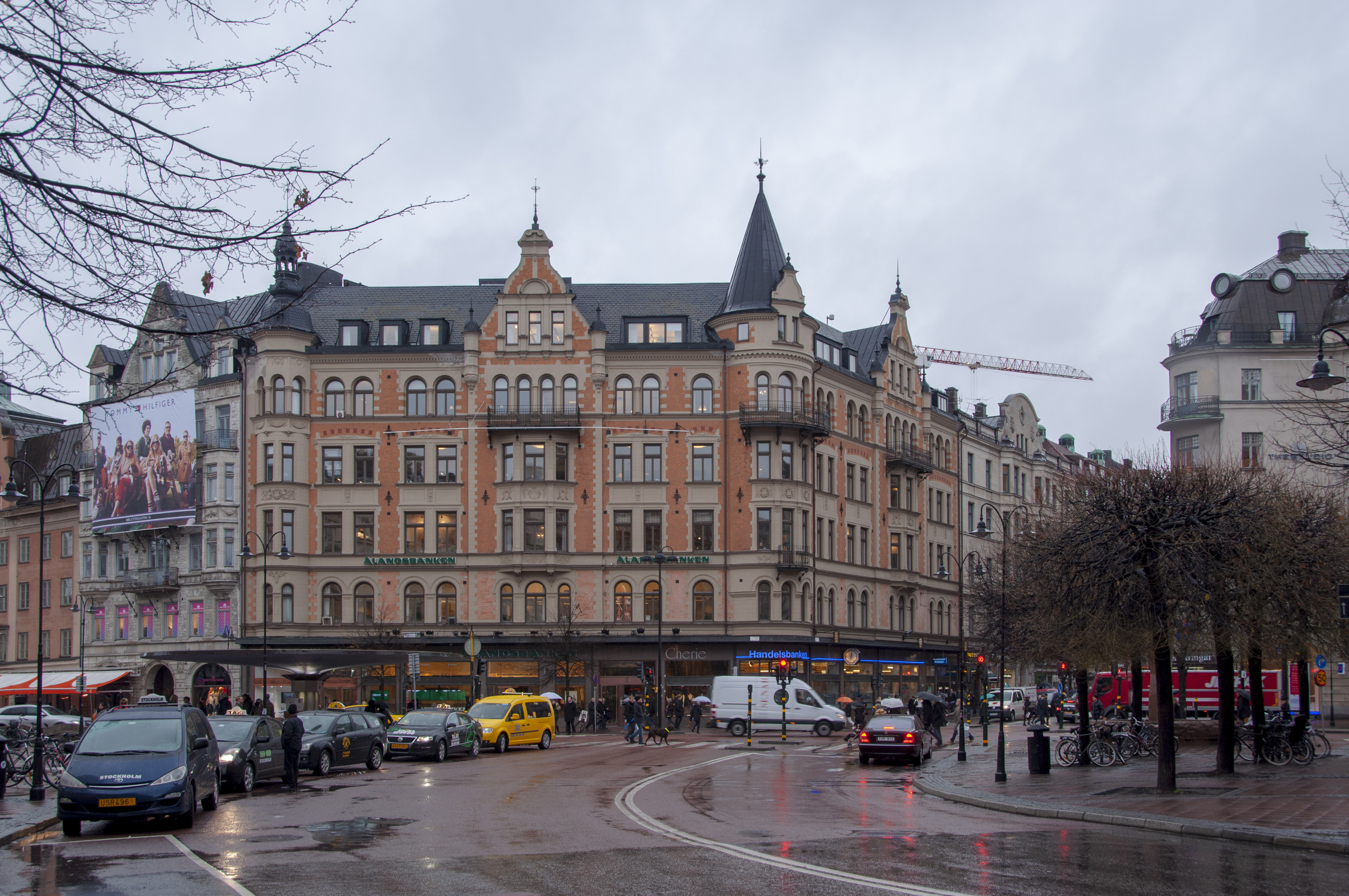 Stureplan 19. Byggnadsår 1893. Arkitekter Carl Kleitz(planer) Edward Ohlsson (fasad)